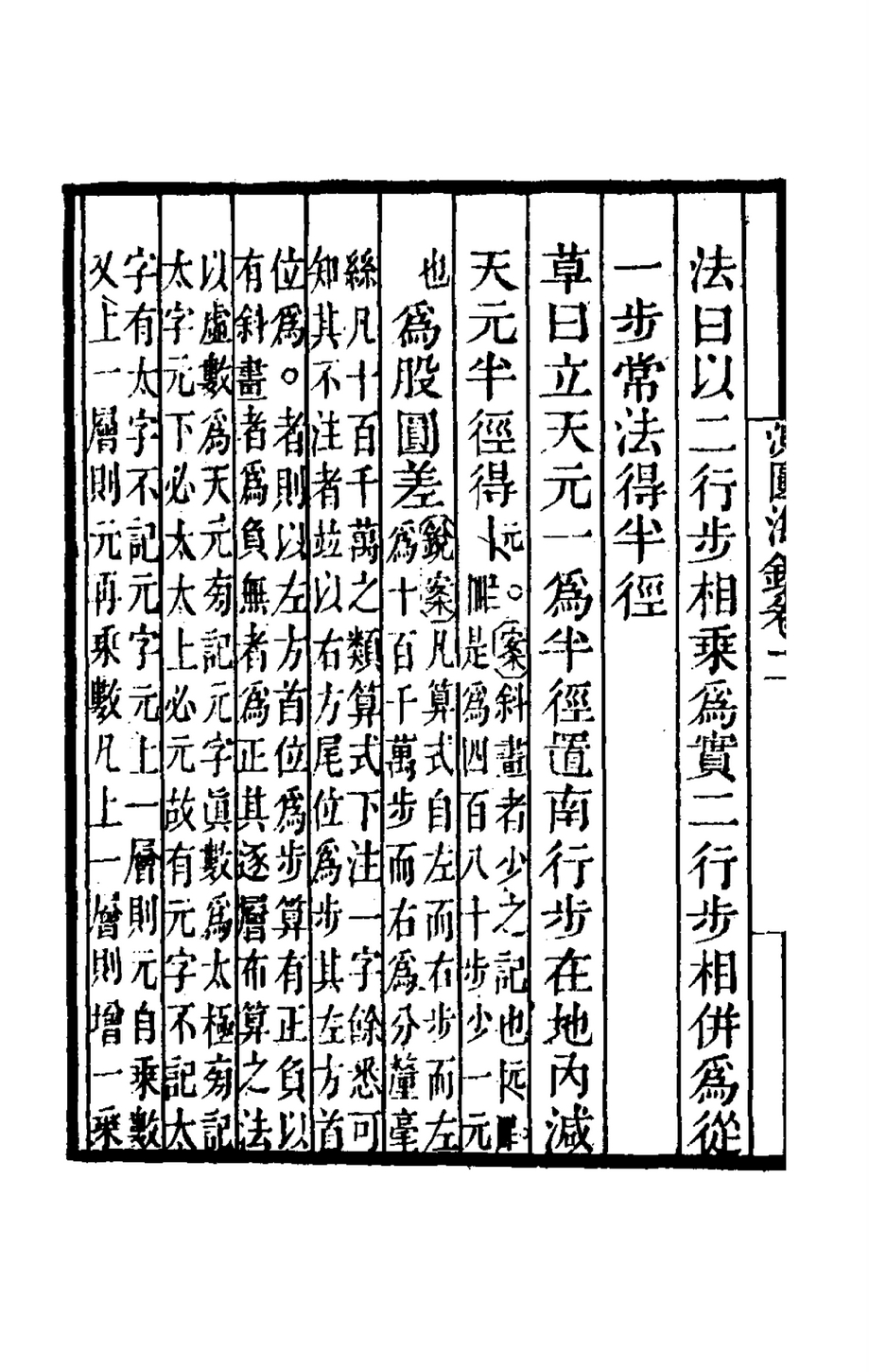 测圆海镜细草 卷二 第十四问